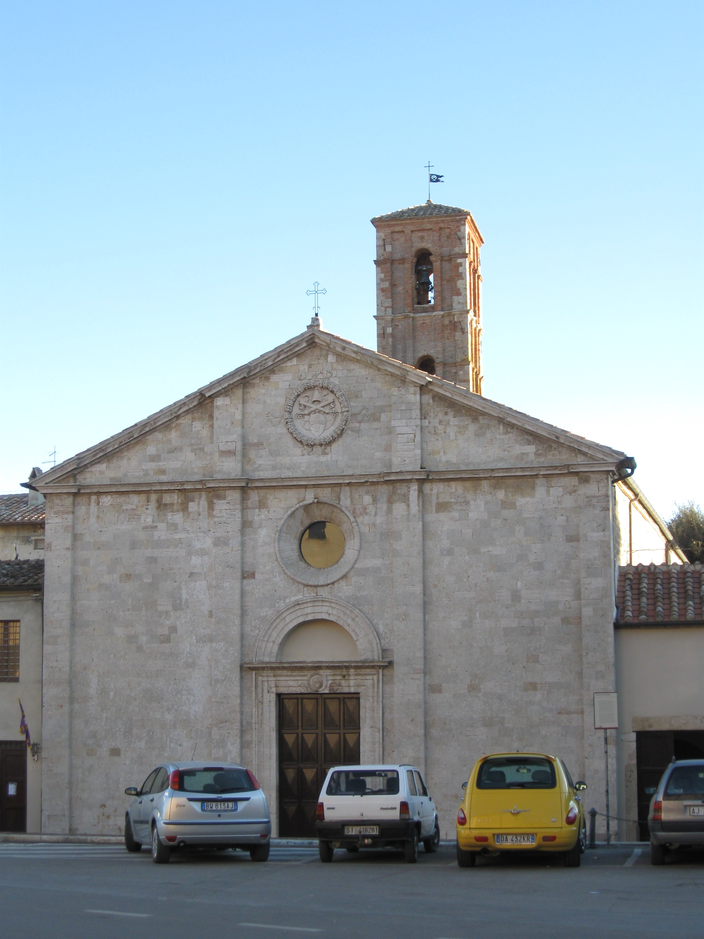 Facciata chiesa di S.Francesco in Sarteano.